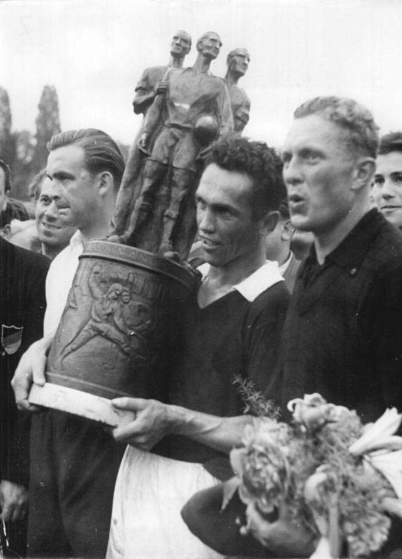 Zentralbild-Kister 20.6.1955 FDGB-Pokal ging nach Karl-Marx-Stadt Vor 18.000 Zuschauern holte sich der "Ewige Zweite", SC Wismut, beim Endspiel um den FDGB-Pokal gegen den SC Empor Rostock im Leipziger Bruno-Plache-Stadion nach zweimal 15 Minuten Verlängerung mit einem 3:2 Erfolg die Trophäe. UBz: Die glücklichen Wismut-Spieler mit dem FDGB-Pokal."